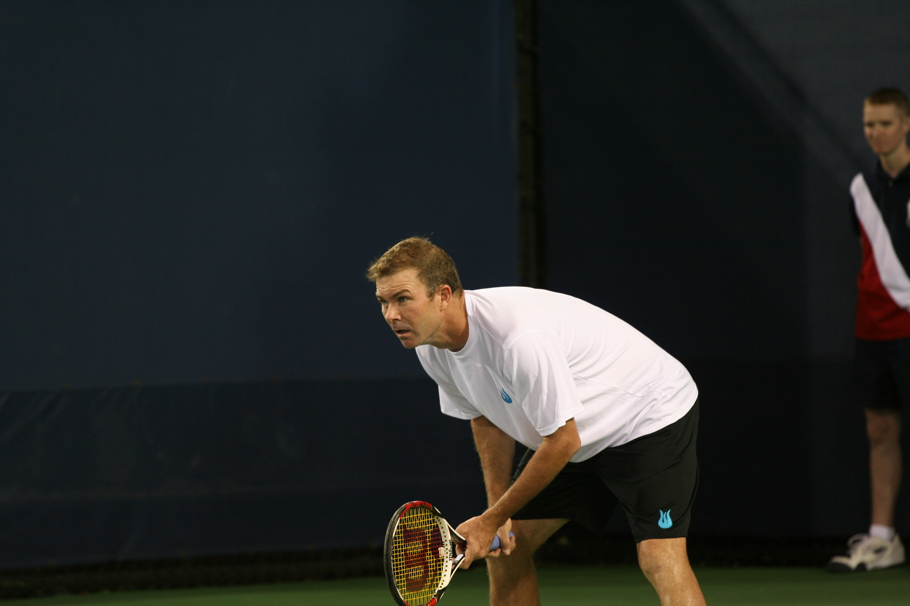 U.S. Open Wednesday, Sept. 2, 2009